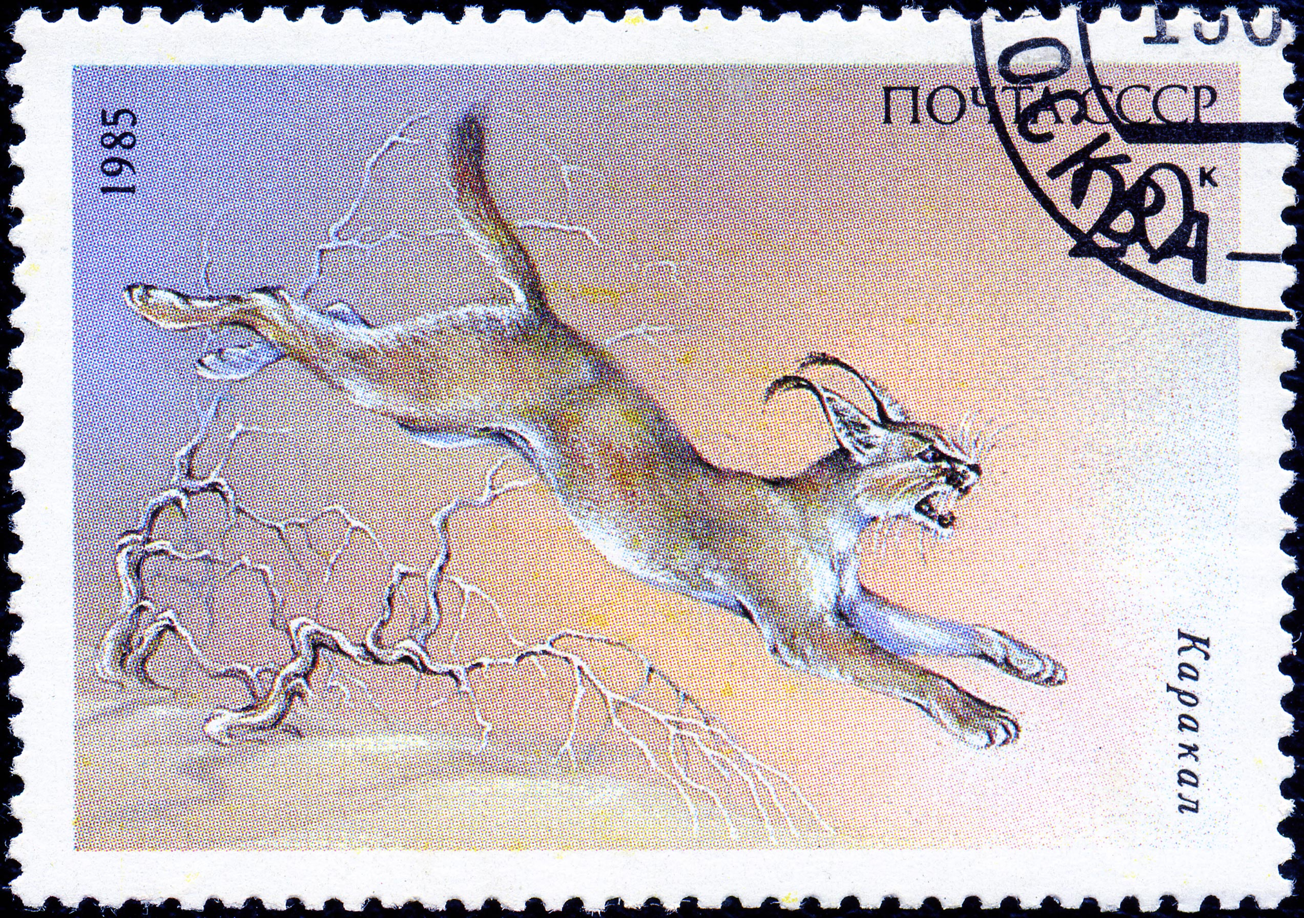 Почтовая марка СССР. 1985. Каракал